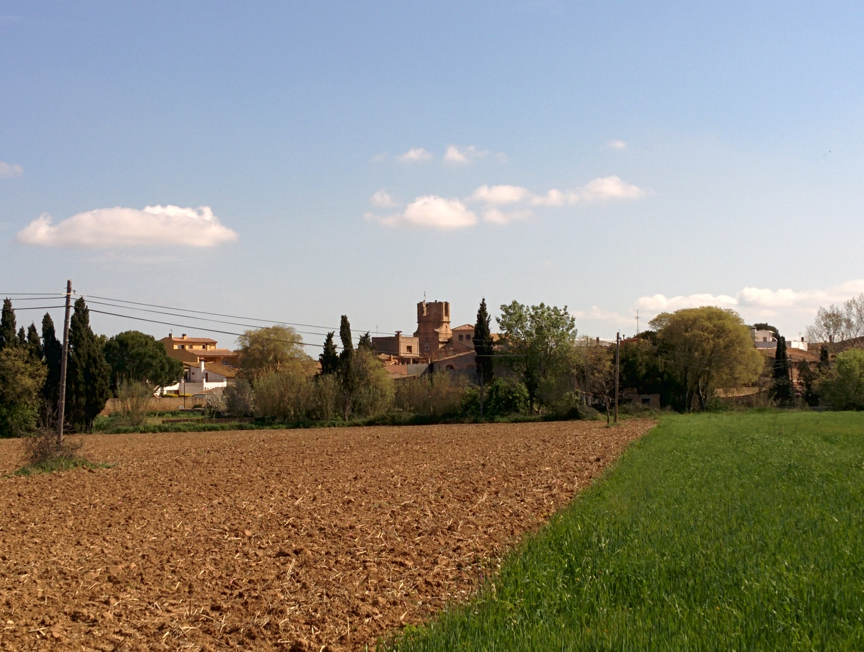 Església de Sant Julià d'Ordis